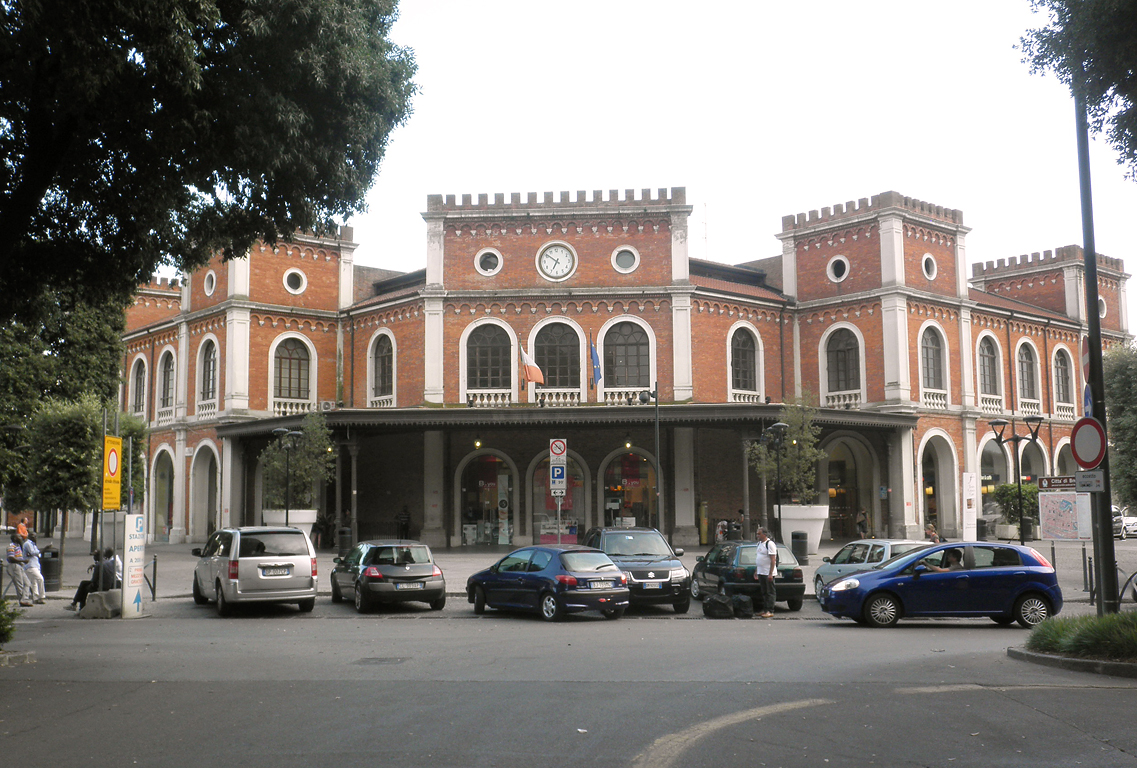 Stazione ferroviaria di Brescia.